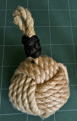 Pomme de Touline de ma fabrication. Photo issue de ma banque d'images